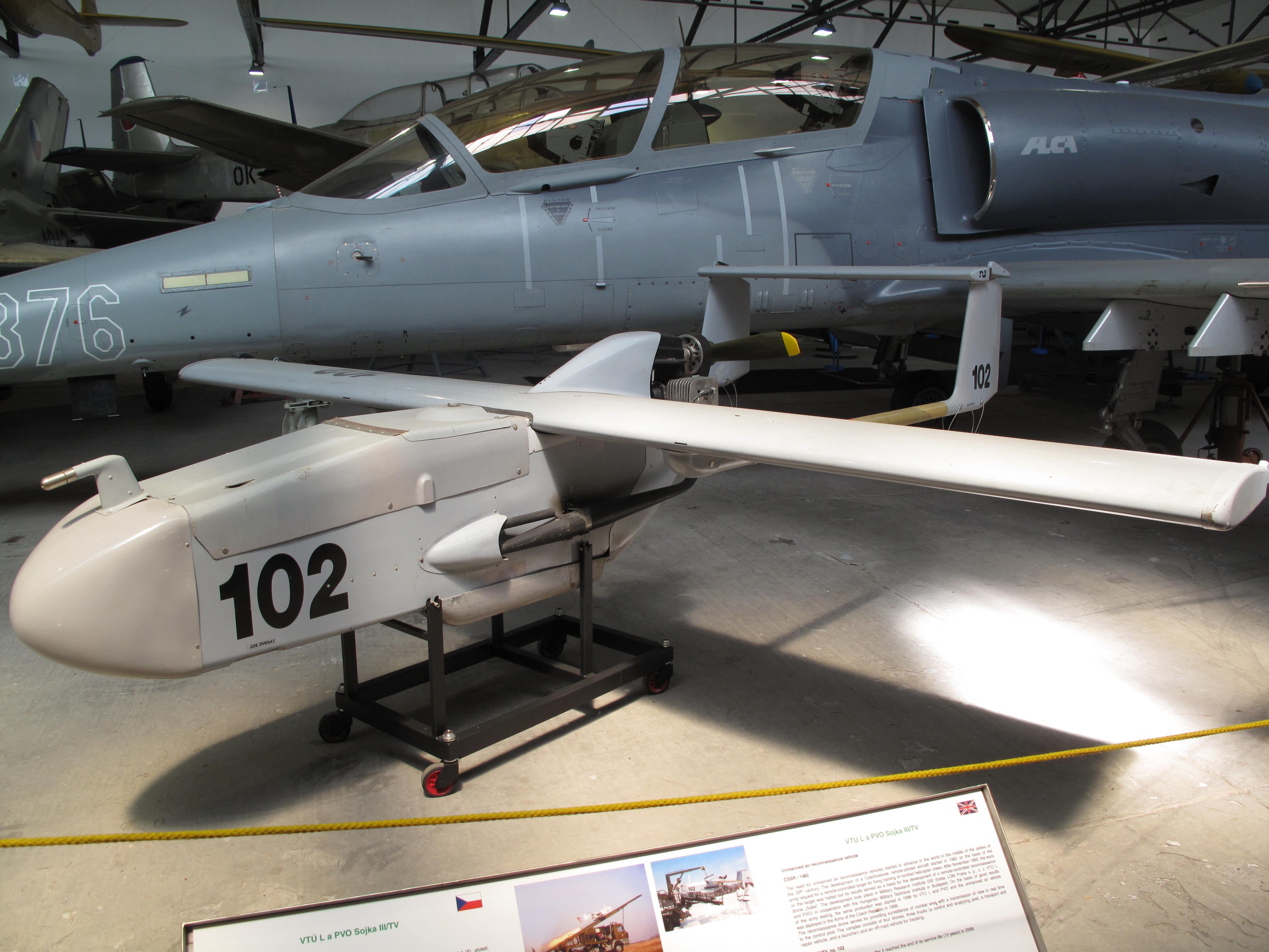 VTU L & PVO Sojka III/TV, Letecké muzeum Kbely